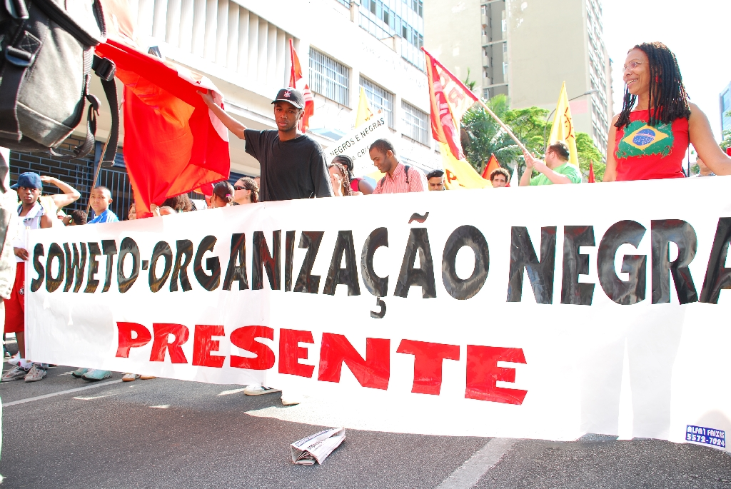 Passeata cívica no Dia da Consciência Negra (2008). Centro de São Paulo.